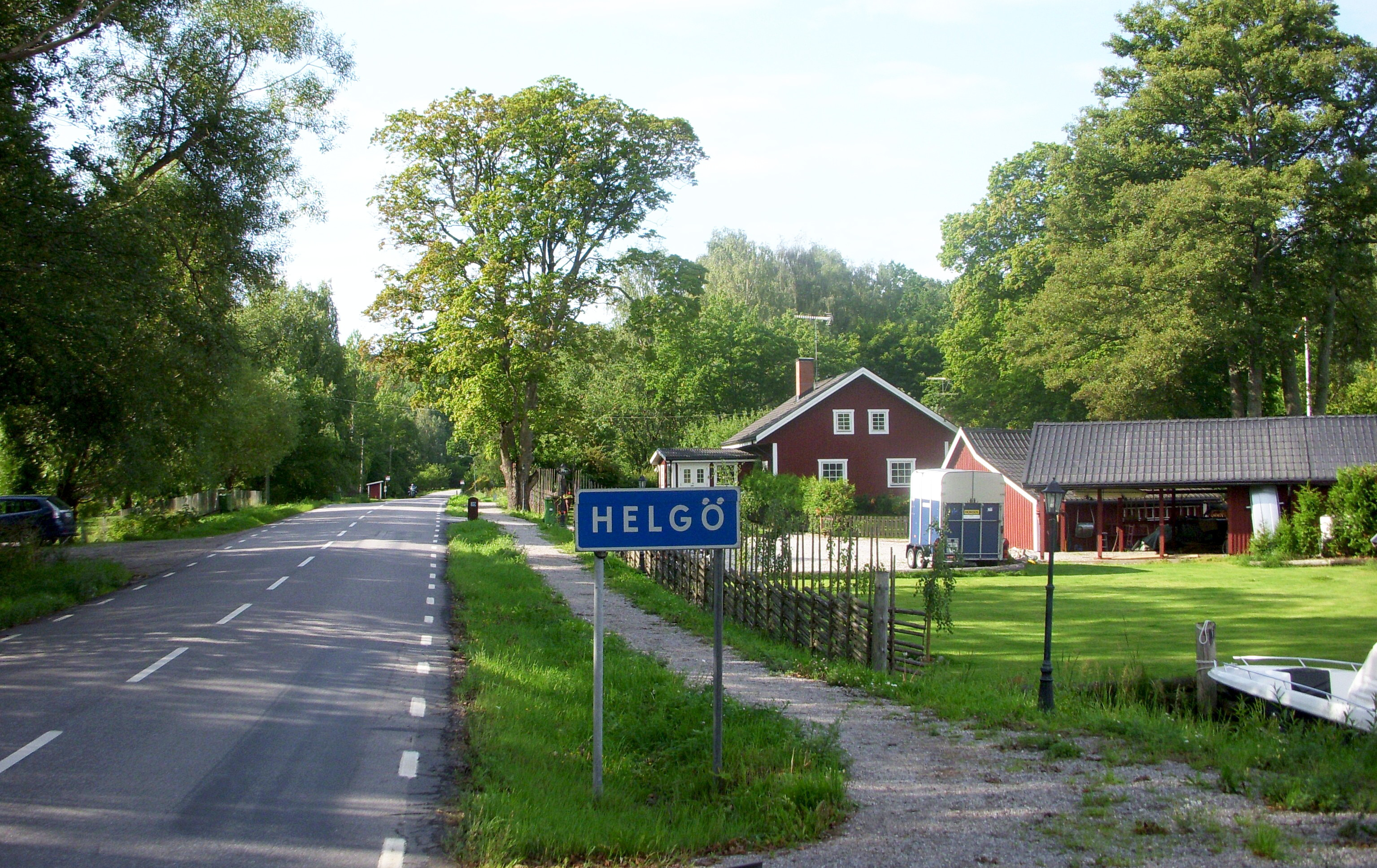 Helgö, Ekerö kommun